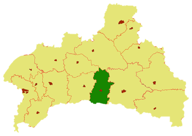 Ivanaŭský rajón v rámci Brestské oblasti